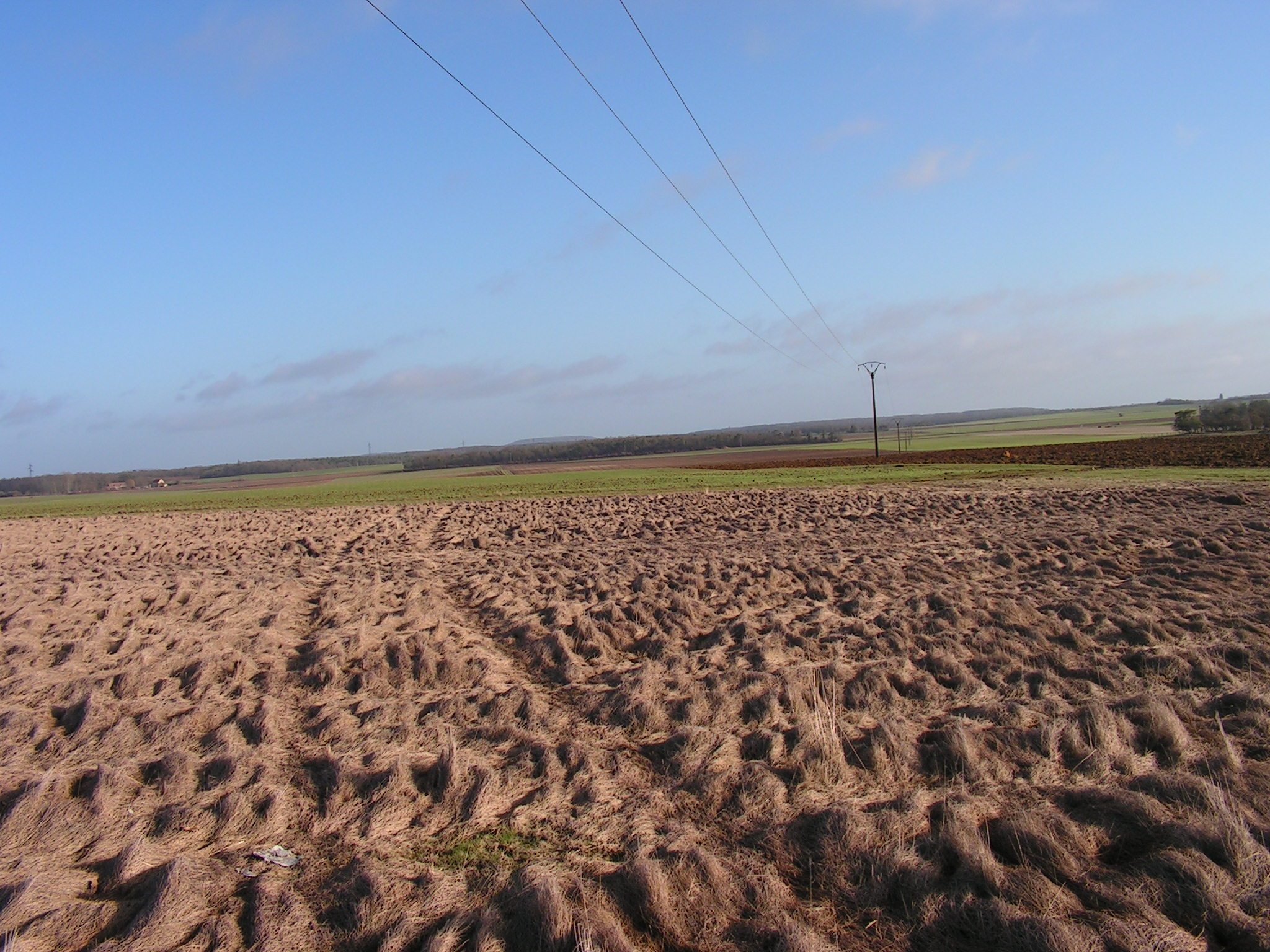 Vue d'une jachère